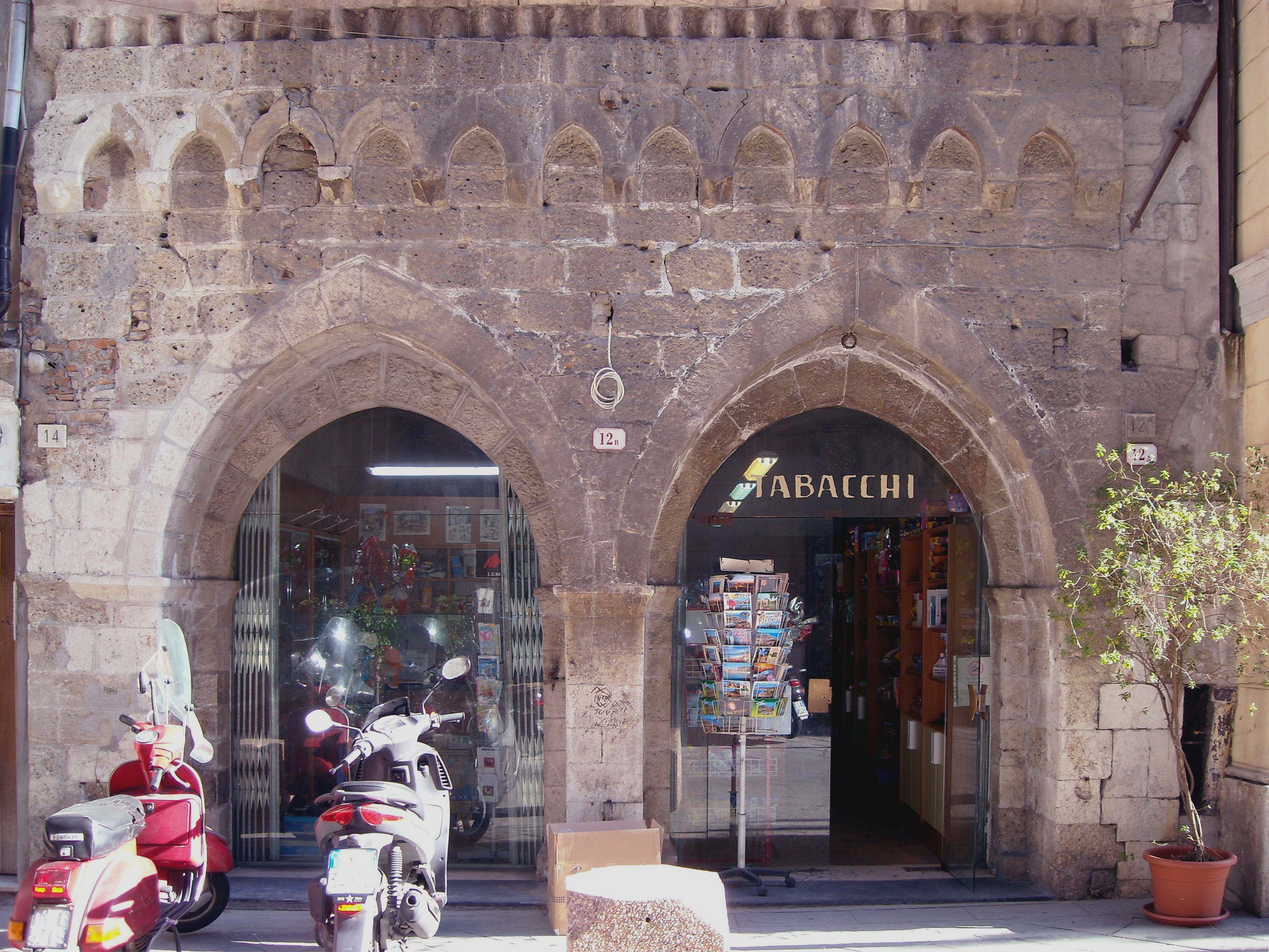 La facciata gotica della loggia del Parlamento situata via Garibaldi nel centro storico di Ventimiglia, Liguria, Italia.